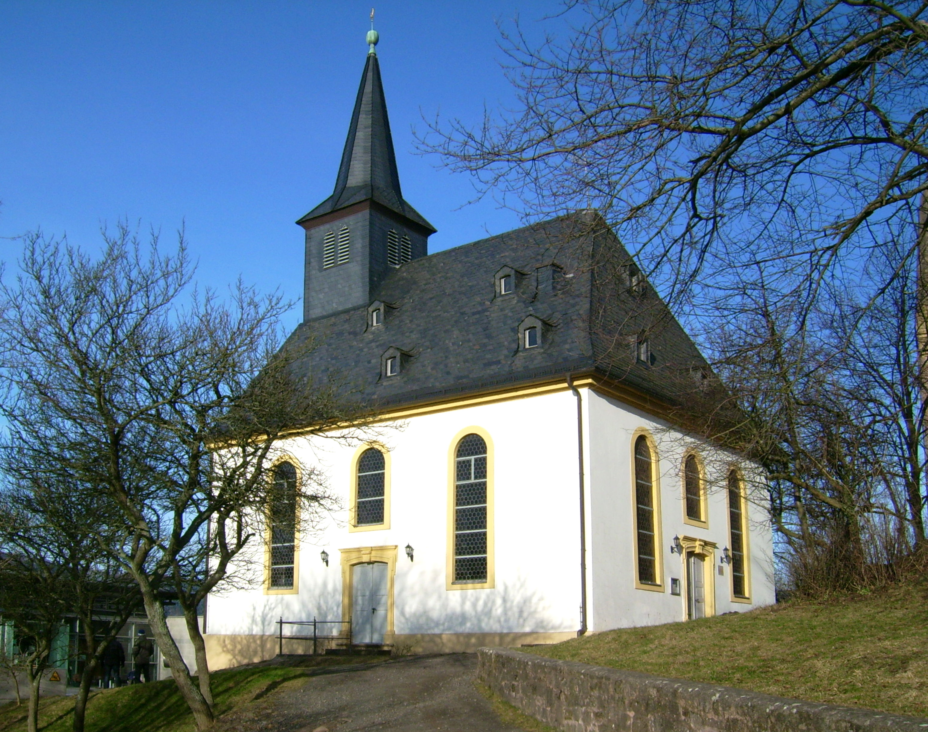 Ev. Kirche in der Burg Lichtenberg